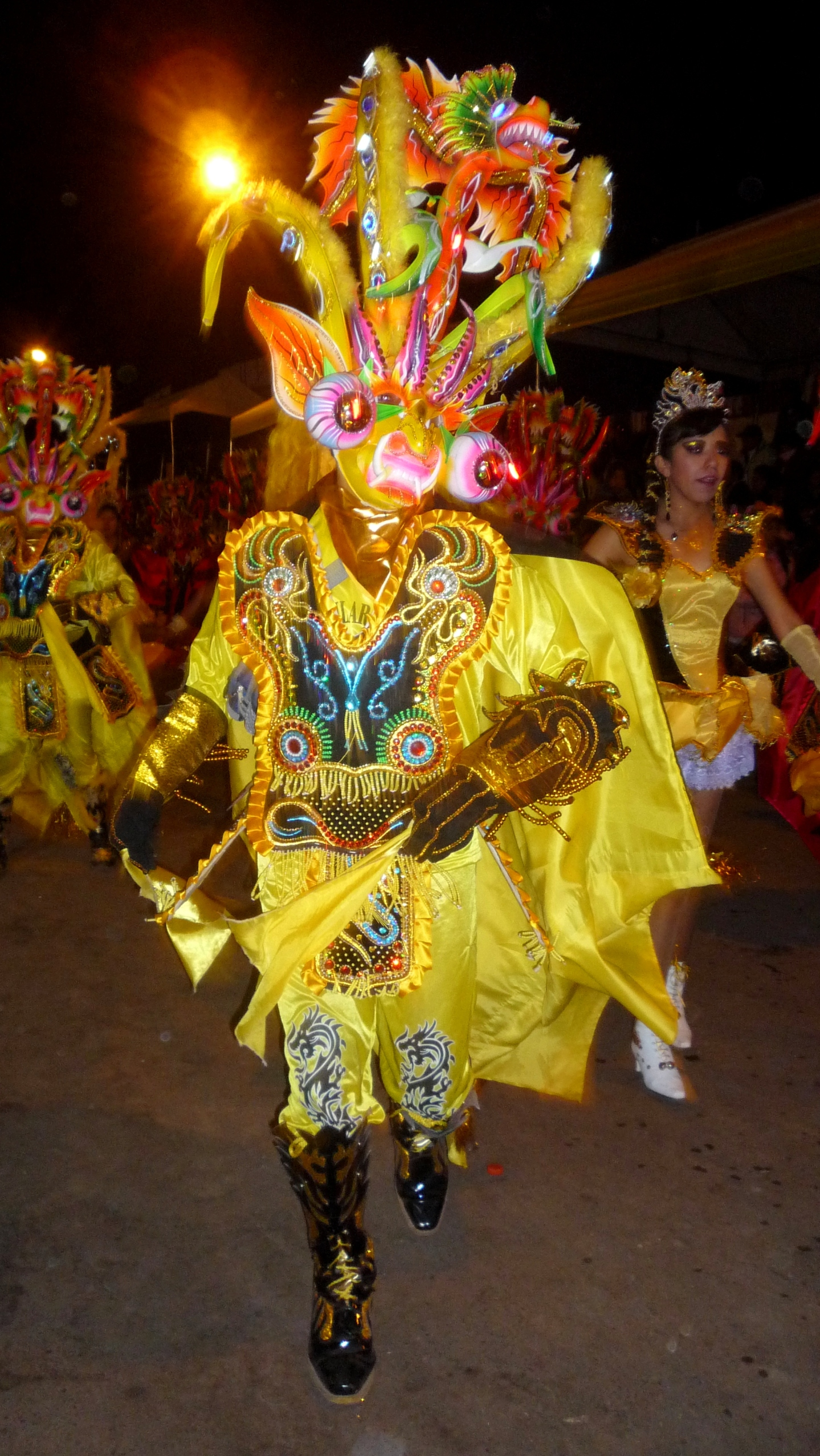 Espectacular Diablada Bellavista